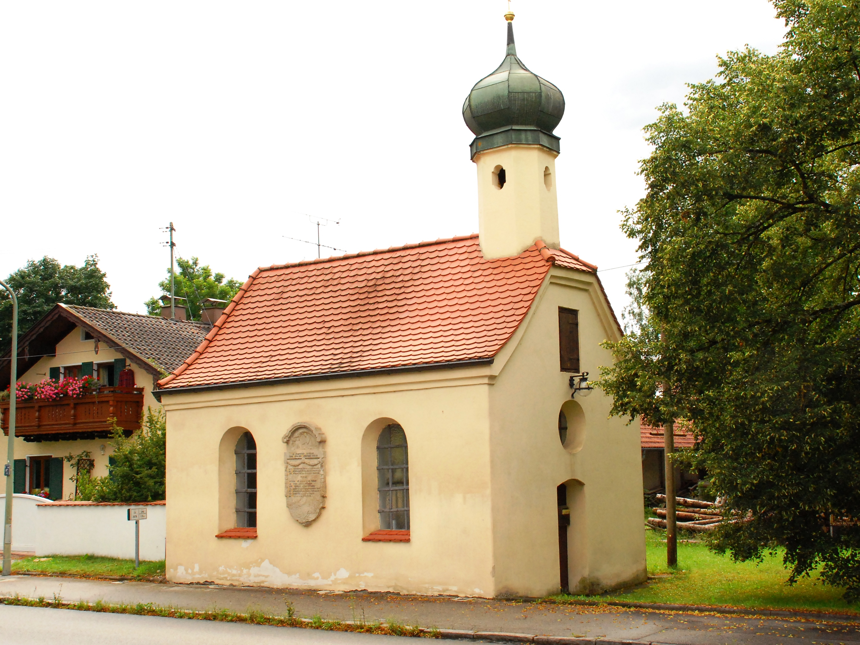 Kapelle Zum Gegeißelten Heiland in der Höhenkirchener Straße 3 in Dürrnhaar, Gemeinde Aying, Landkreis München, Regierungsbezirk Oberbayern, Bayern. Als Baudenkmal unter Aktennummer D-1-84-137-22 in der Bayerischen Denkmalliste aufgeführt. Laut Denkmalliste 1746 erbaut.